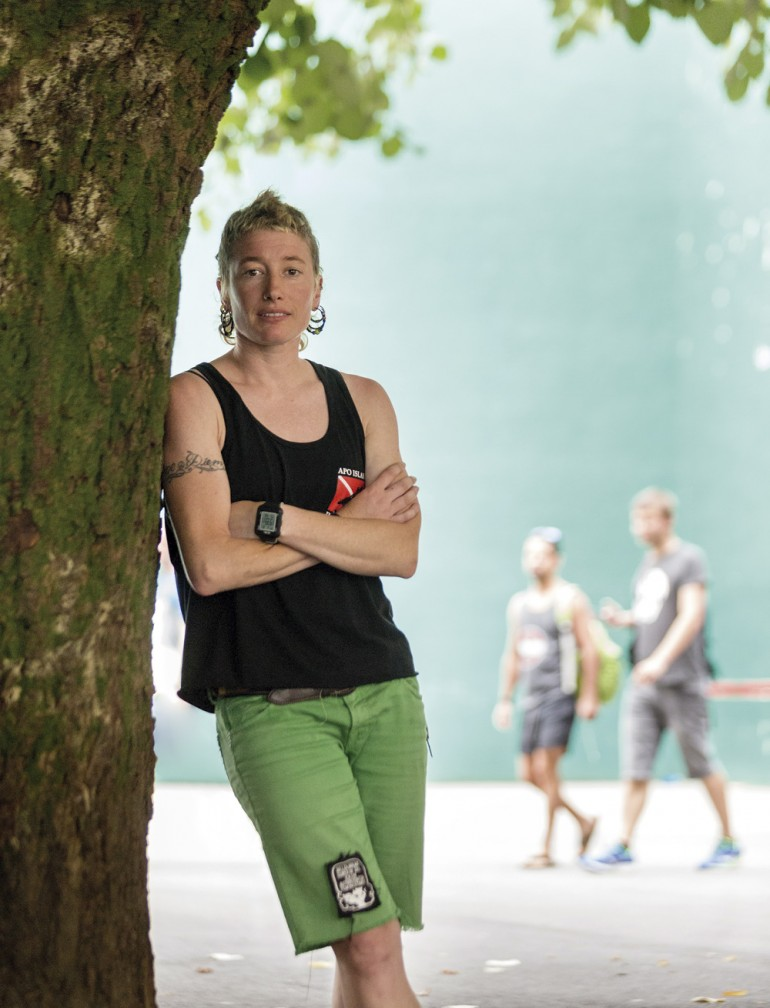 Patri Espinar pilotaria eta futbolaria